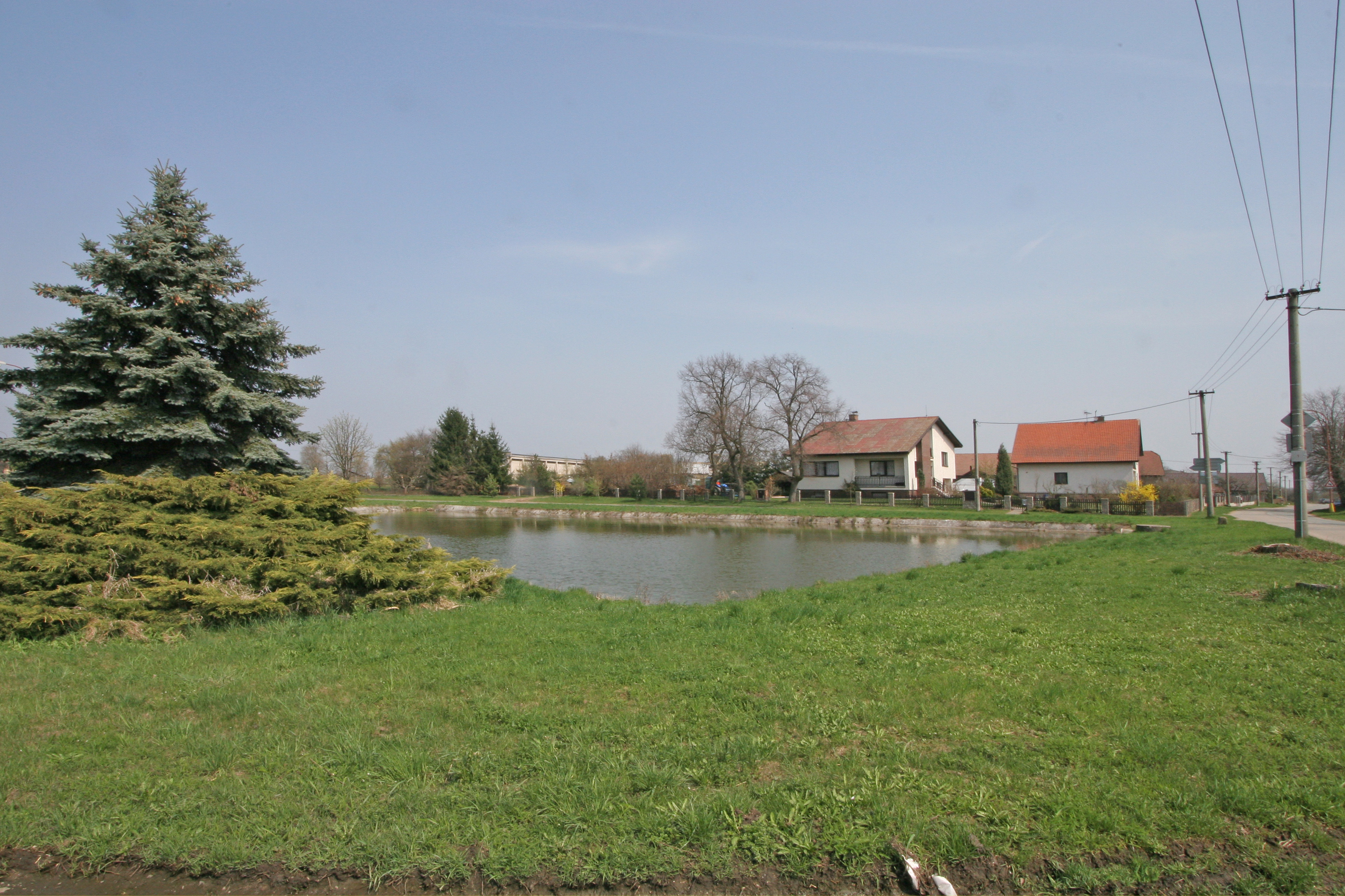 Kosičky návesní rybník